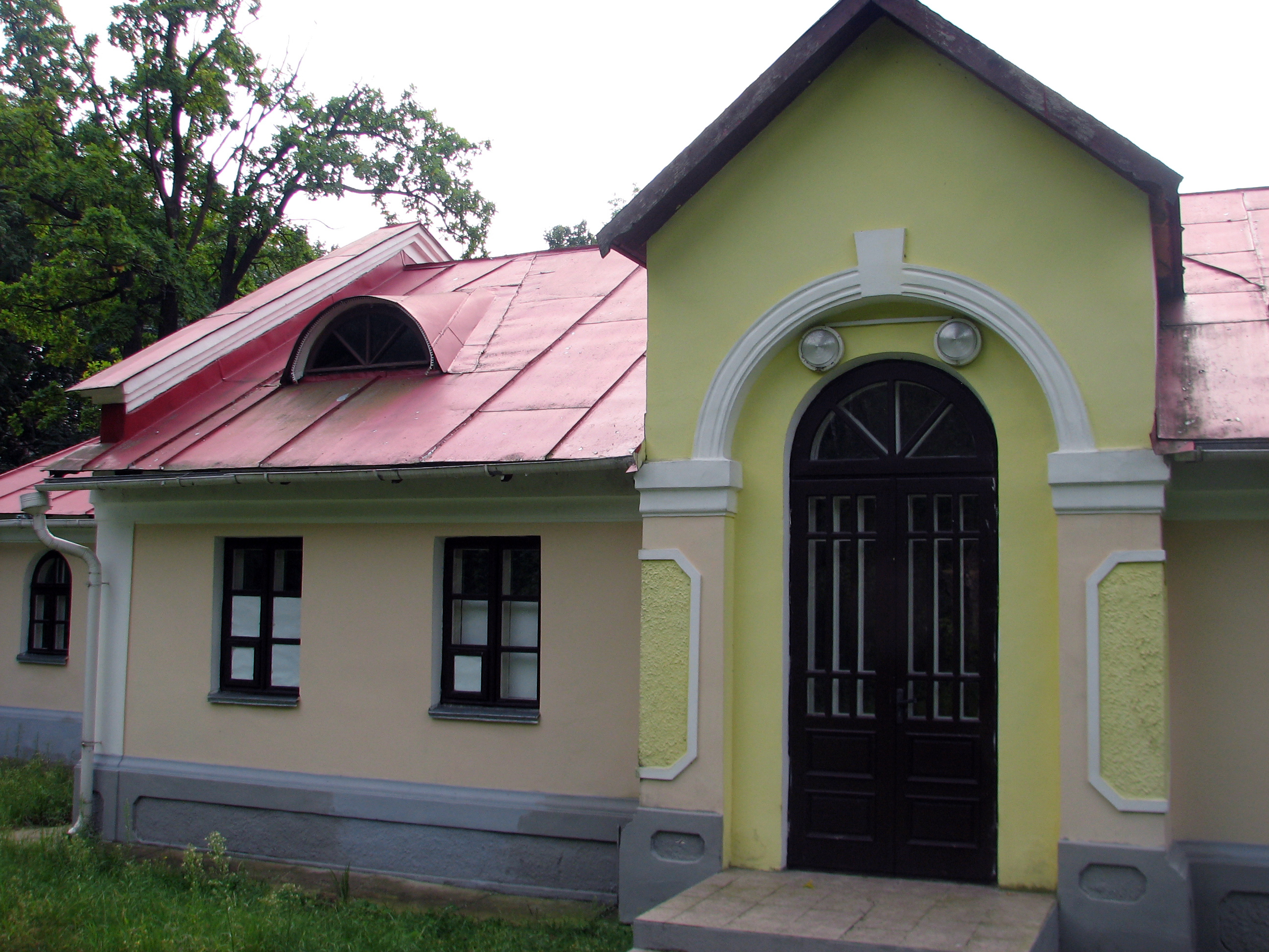 Беларуская (тарашкевіца): Пружанскі палацык. Будынак былой аранжарэі